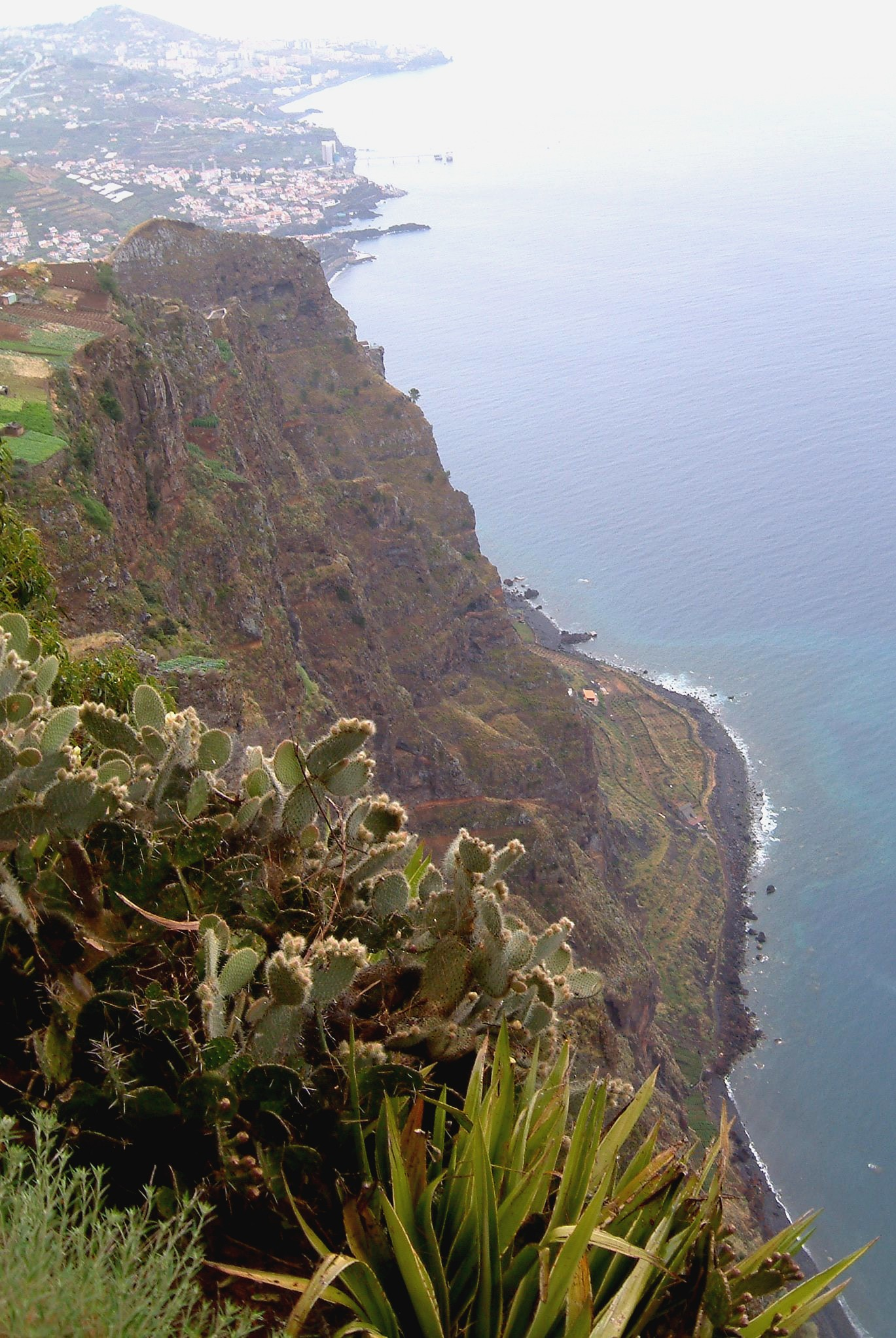 Madeira_Blick_von_cabo_girao_580_m_in_die_Tiefe_5-07 (im Osten Funchal). Photograph: Peggy